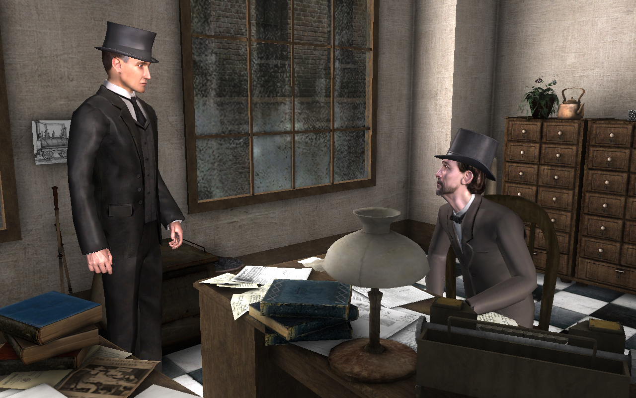 Capture d'écran du jeu Sherlock Holmes contre Jack l'Éventreur. Holmes, à gauche, est ici face à Thomas Bulling, à droite, le journaliste suspecté d'âtre à l'origine de la lettre "Dear Boss" qui a créé la psychose à Whitechapel à l'époque des meurtres.